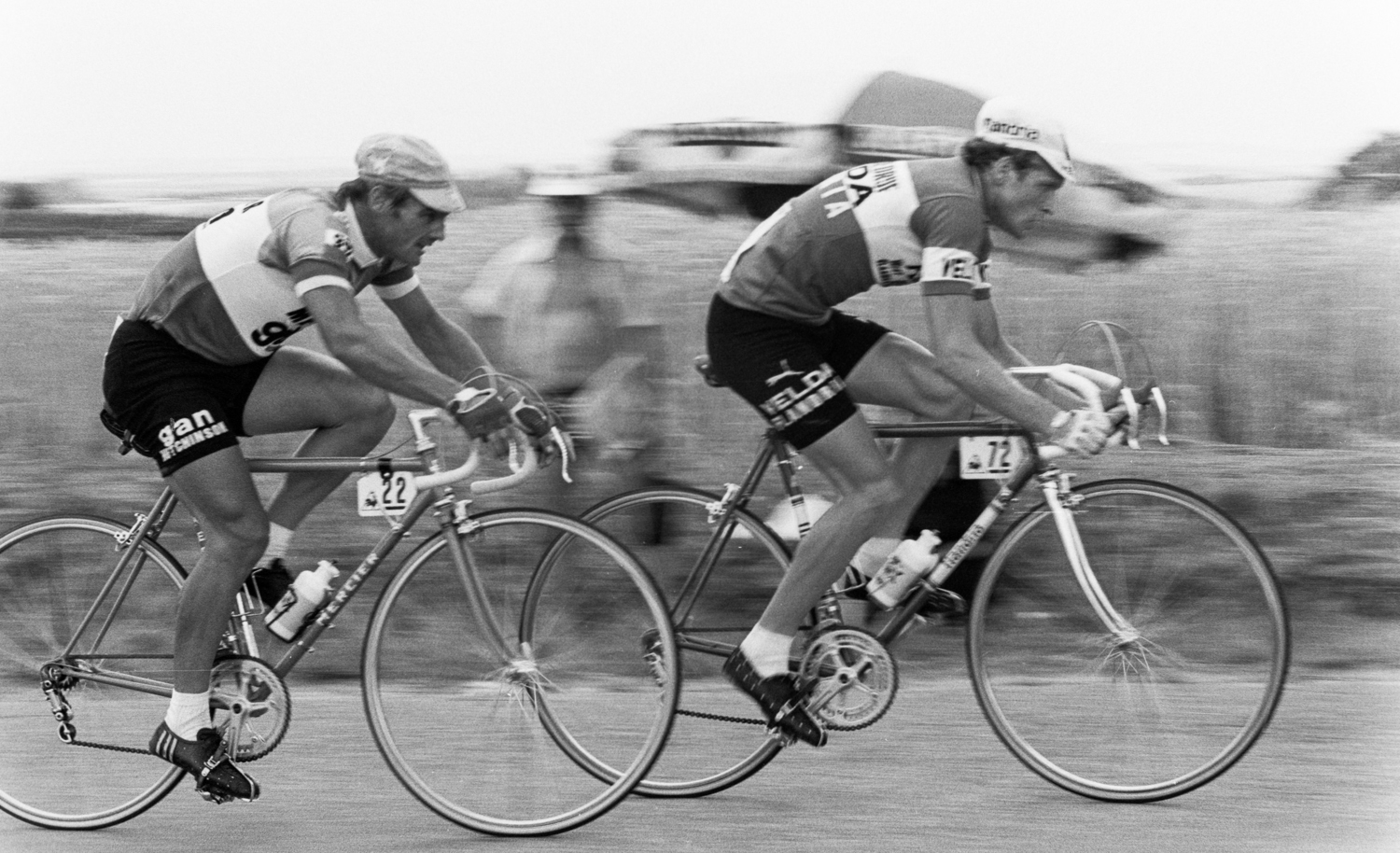 Régis Delépine et Herman Beysens durant le Tour de France 1976. Photographie : René Milanese